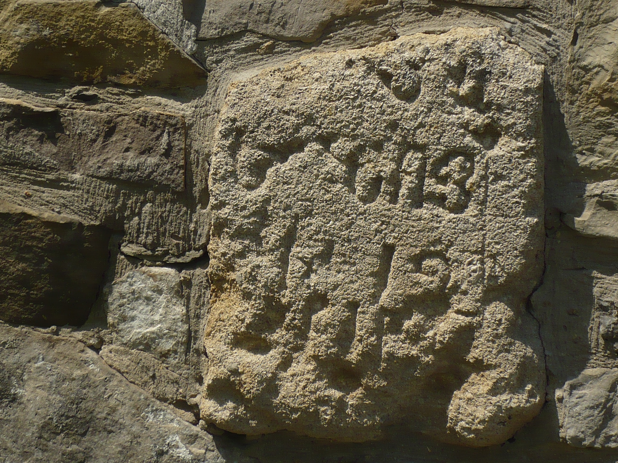 Tablica na murze wokół kościoła ormiańskiego pw. Niepokalanego poczęcia NMP